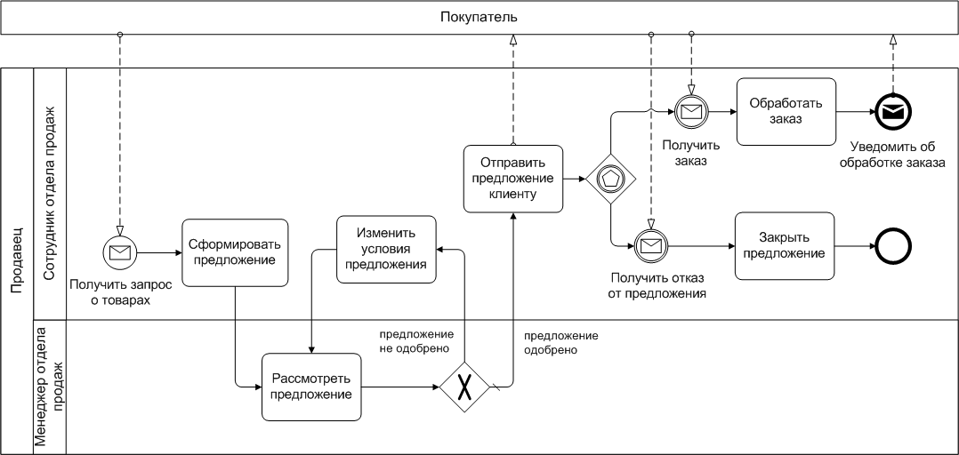 Пример модели бизнес-процесса в BPMN 1.1: Запрос о товарах